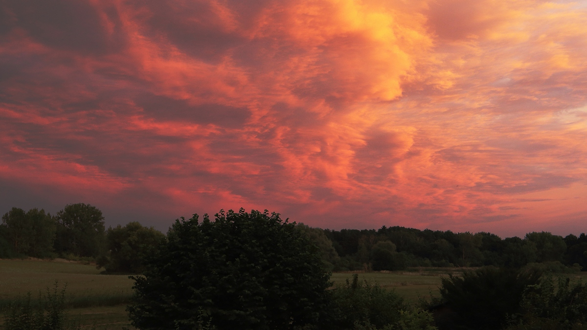 Abendrot über mecklenburgischen Wäldern, Röbel/Müritz